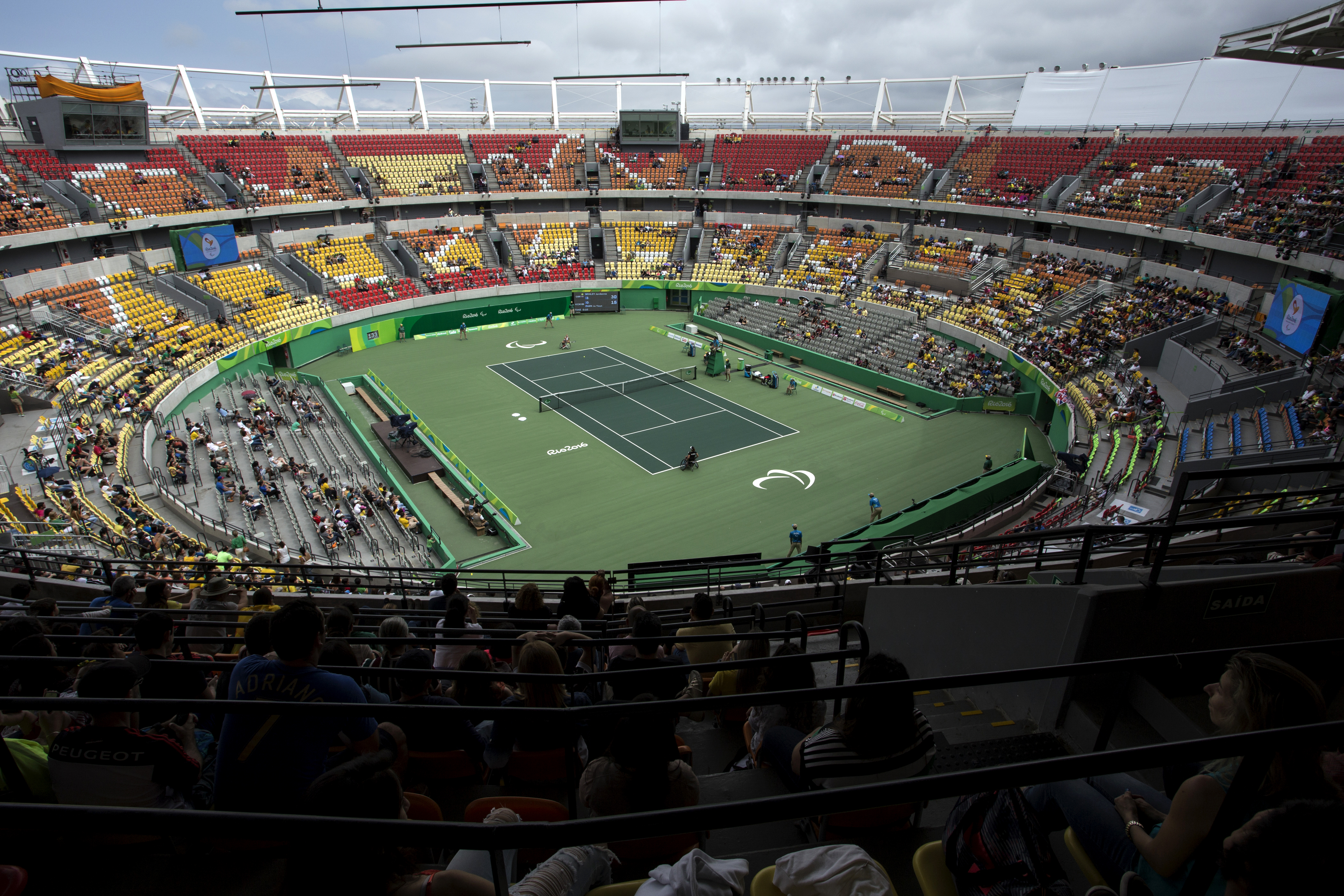 Competição feminina de tênis durante os jogos paralimpicos Rio 2016 - Parque Olímpico - Complexo Esportivo Cidade dos Esportes na Barra da TijucaLocal: Rio de Janeiro - RJData: 09/2016Autor: Rubens Chaves